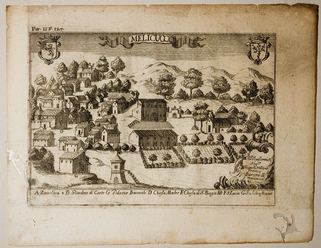 "Melicucco" dell'abate Giovanni Battista Pacichelli OPERA: "Il Regno di Napoli in prospettiva diviso in dodici province"